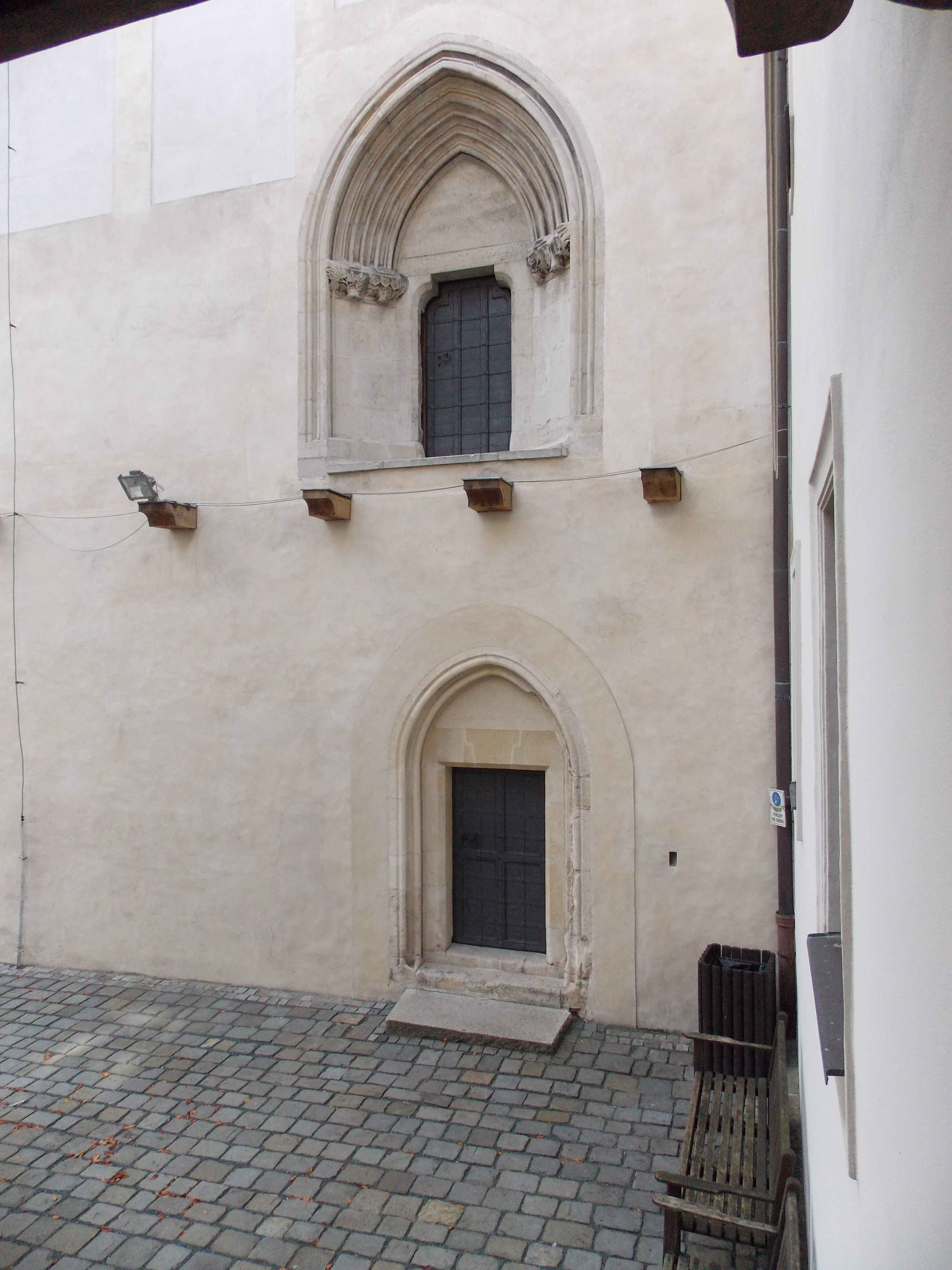 Arch of great hall to former gallery (upper), Arch of lower hall Špilberg castle Brno (1375 - 1411 Jobst's residence)